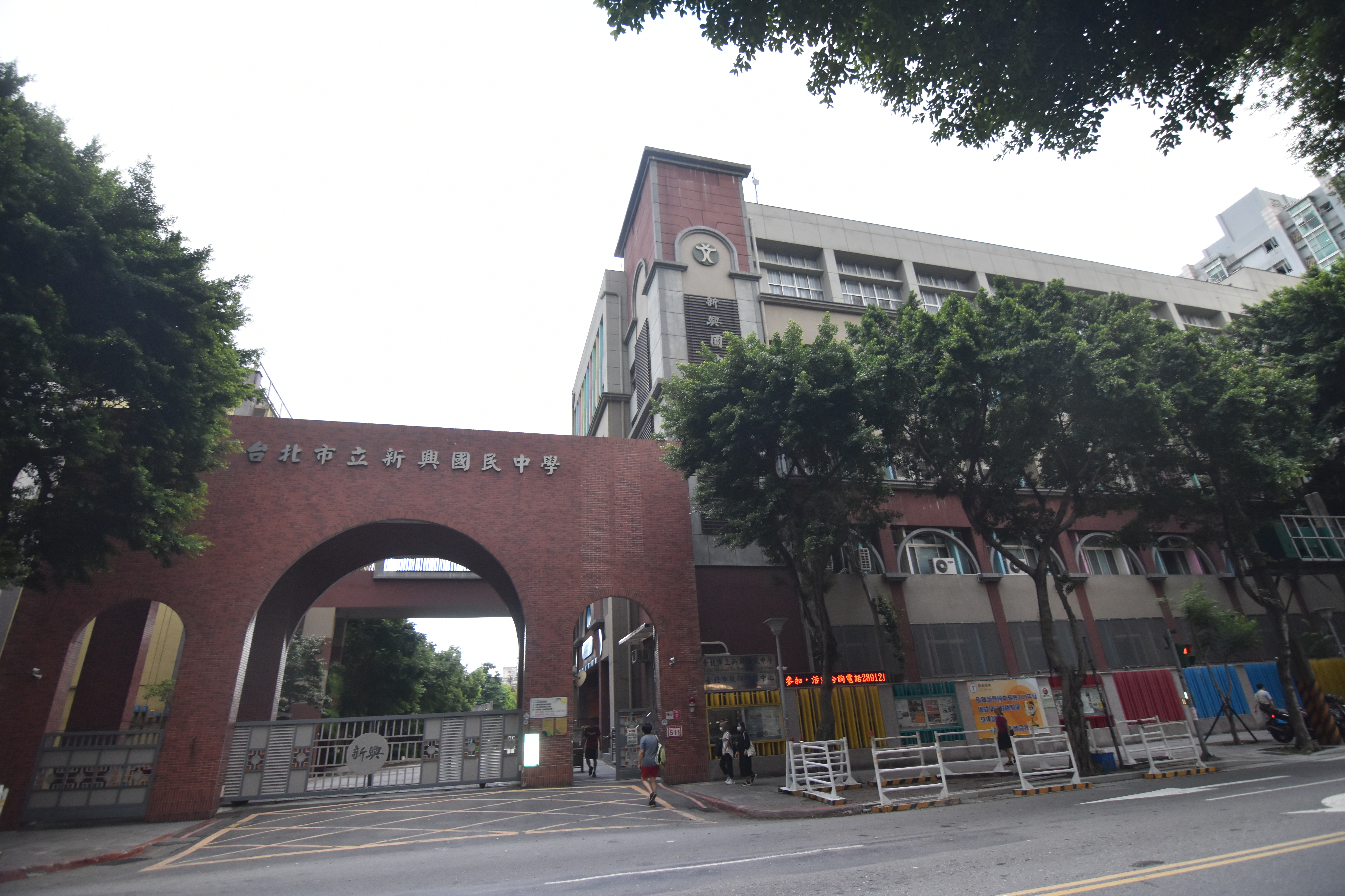 中文（台灣）: 新興國中成立於1968年，校址臺北市 中山區林森北路511號，是大家耳熟能詳，香火鼎盛的行天宮舊址，在這充滿上天庇蔭，與祝福的校地，建立起一所優質又宏偉的校園，在歷任校長與教職員的努力下，新興國中漸成一所優質的學園。校門外觀。 0544128,121.5634318, 臺北市新興國中北市中 山區林森北路511號座標25.0544128,121.5634318